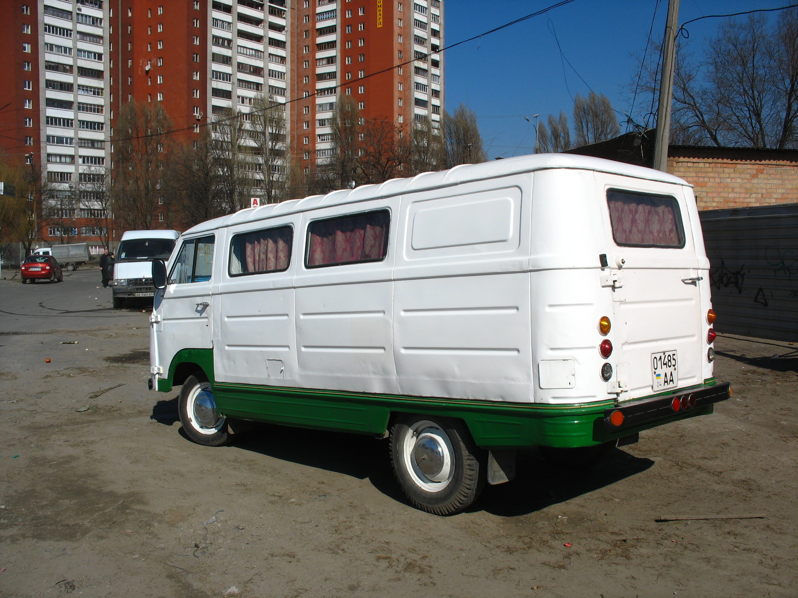 ЕрАЗ-762B — развозной фургон, выпускавшийся Ереванским автомобильным заводом, Армянская ССР. Фотография сделана в Днепропетровске 23 марта 2007-го года.